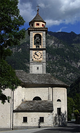 Kirche von Frasco